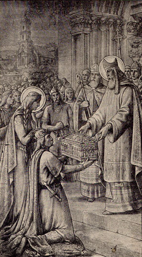 Saint Patern recevant des reliques - L'église de Plounéour-Trez et ses vitraux par l'abbé Stéphan, Curé-Doyen de Saint-Renan